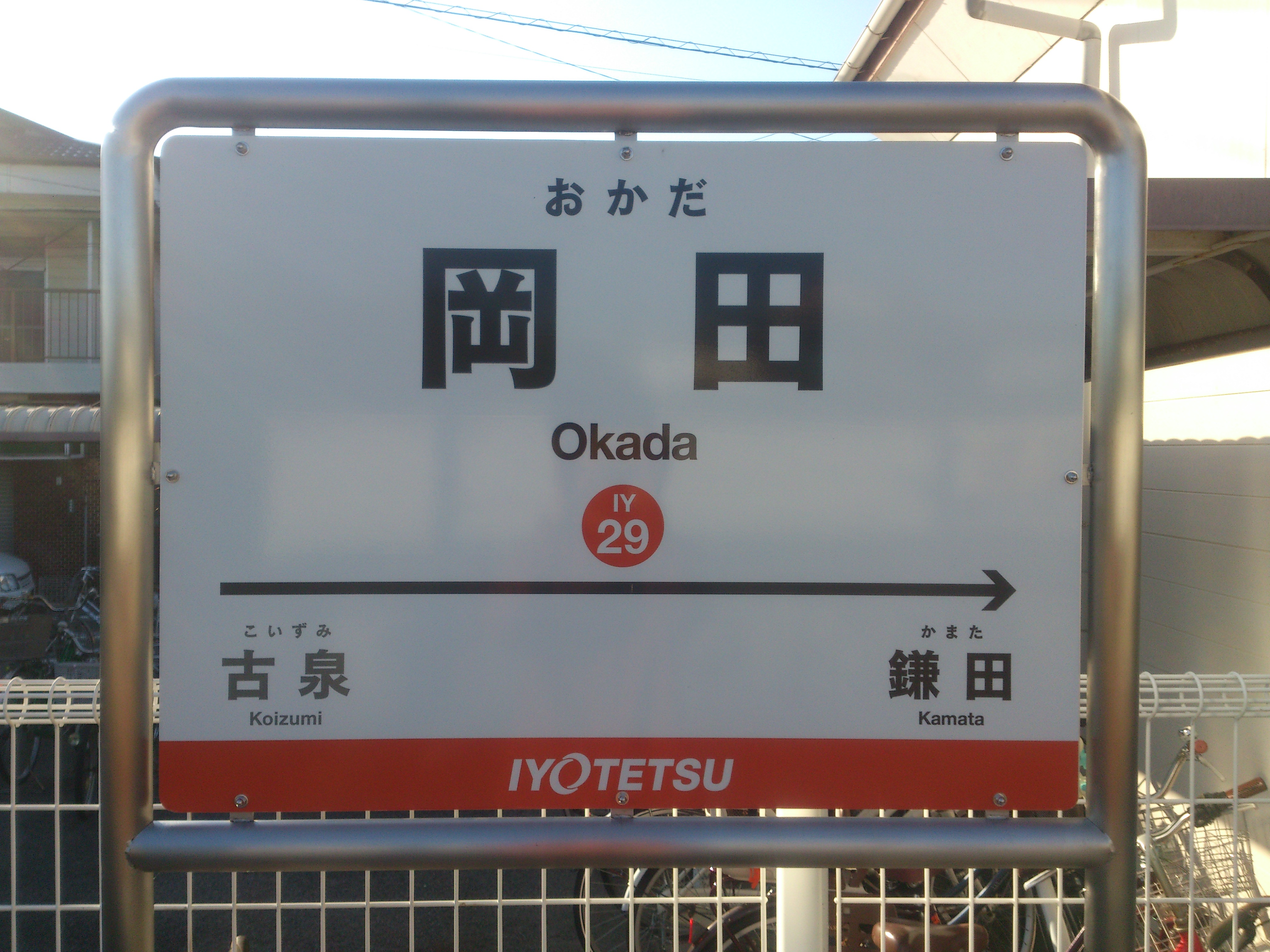 伊予鉄道 岡田駅の駅名標